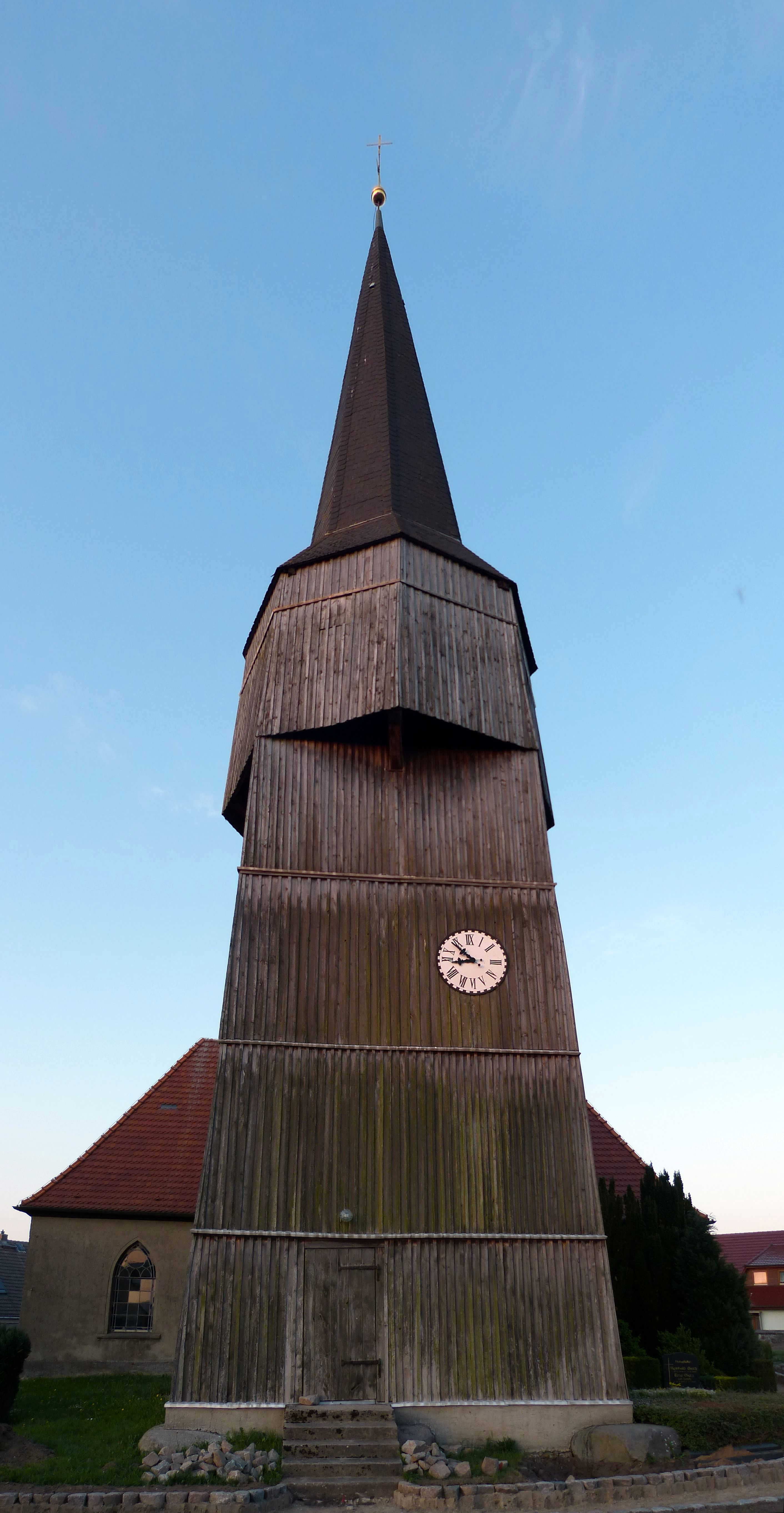 Bartow Vorpommern, Westseite des Kirchturms